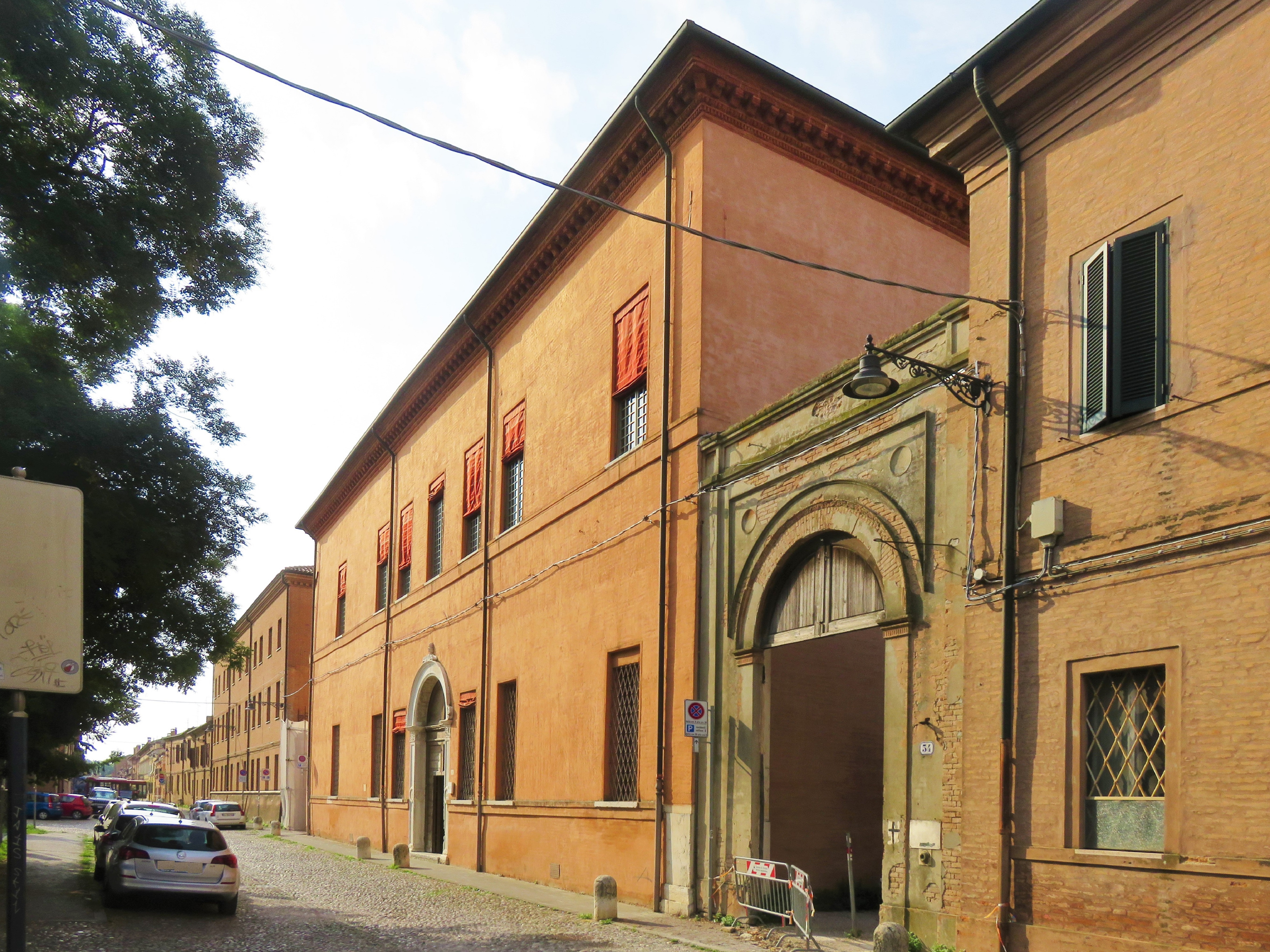 Palazzo Tassoni Estense. Facciata su via della Ghiara.